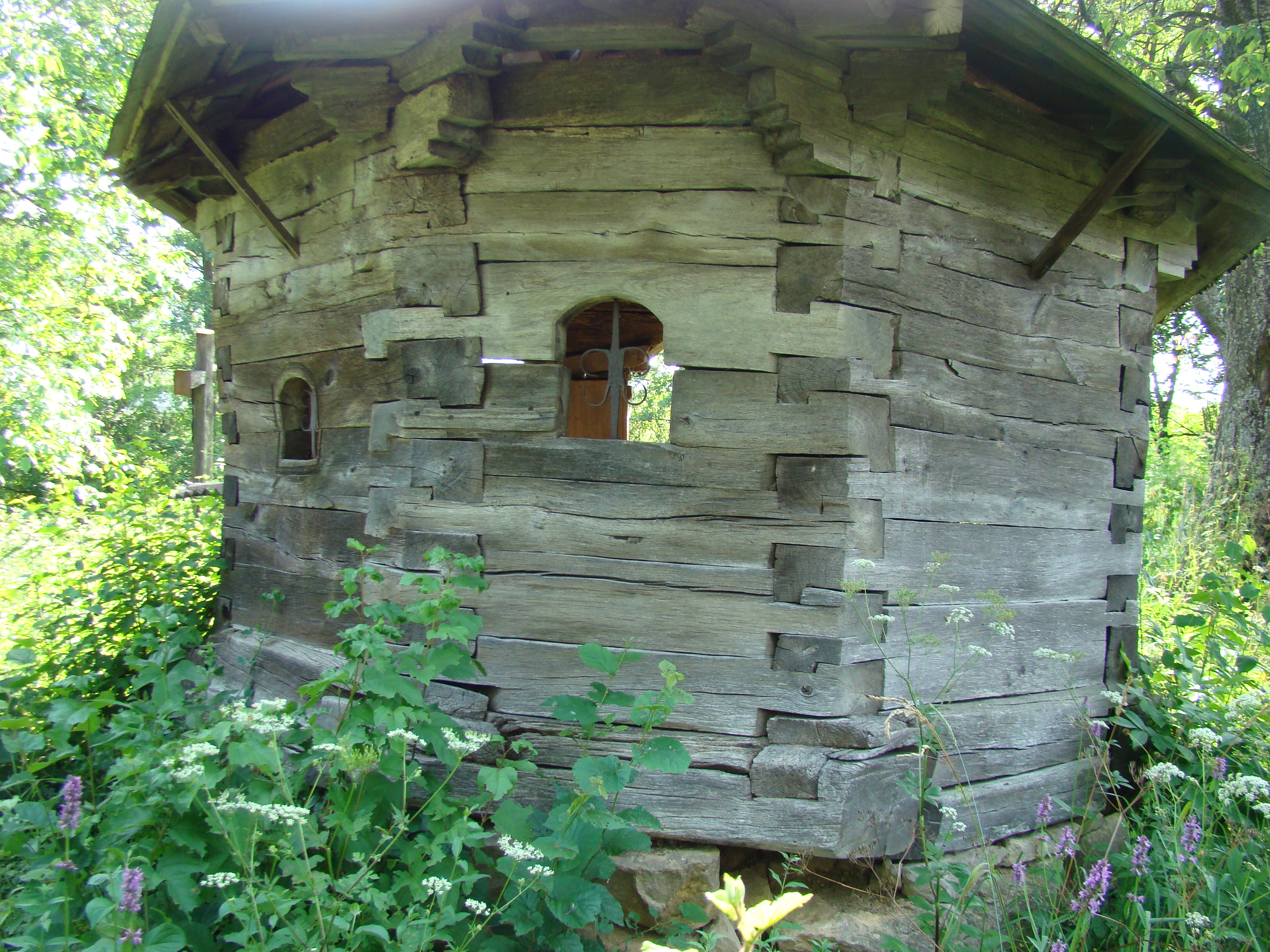 Absida bisericii de lemn "Sf. Arhangheli Mihail şi Gavril" , sat aparţinător CUFOAIA; oraş TÂRGU LĂPUŞ